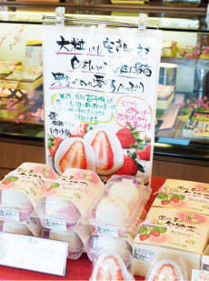 Enshū Ōtsubu Kanjuku Ichigo Daifuku was sold at Ogasa Main Shop, Takoman Co., Ltd.